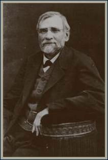 Oskar Kolberg (1814-1890) – polski etnograf, folklorysta i kompozytor.